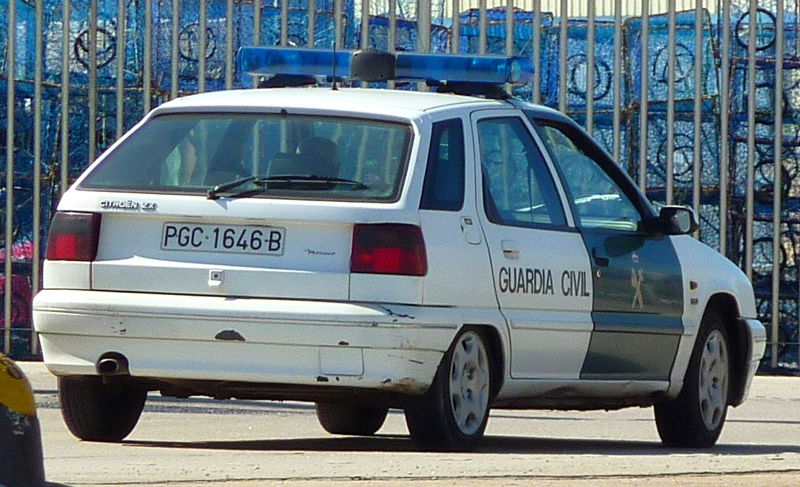 Citroën ZX de la Guardia Civil.